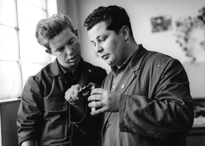 Salzgitter AG/Niedersachsen Lehrlingsausbildung